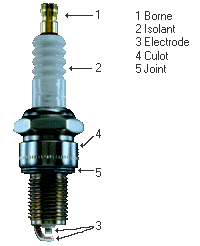 Une bougie d'allumage totalement libre de droit propriétaire jean-luc faisans cedé à wikipédia